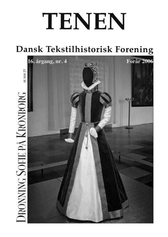 Tidsskriftet TENEN, eksempel. Rettighedshaver er Frits Lilbæk, Allerød, Danmark.